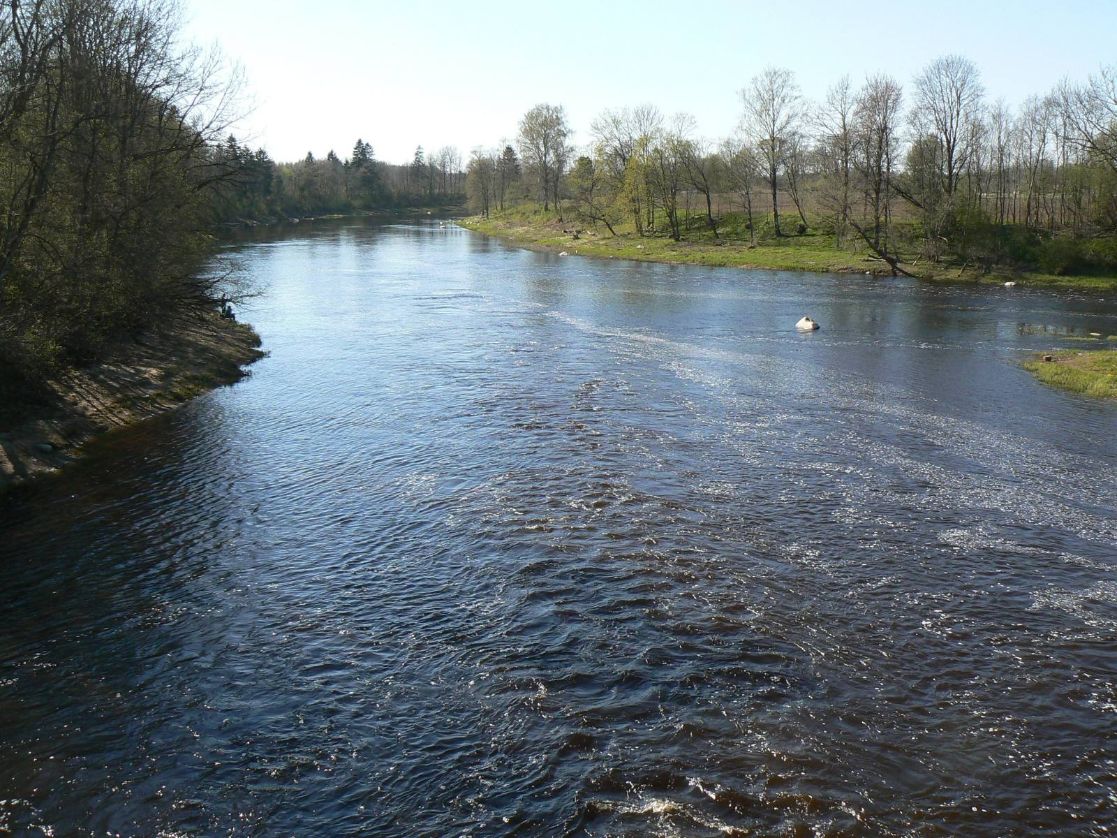 Navesti jõe suue